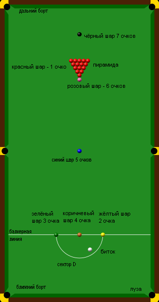 Snooker table